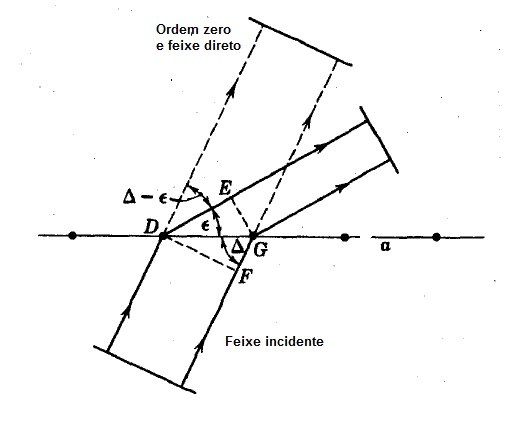 Figura 7 dispersão feixe